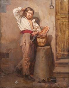 Alfred Alexandre Delauney - Il Garzone Del Panettiere